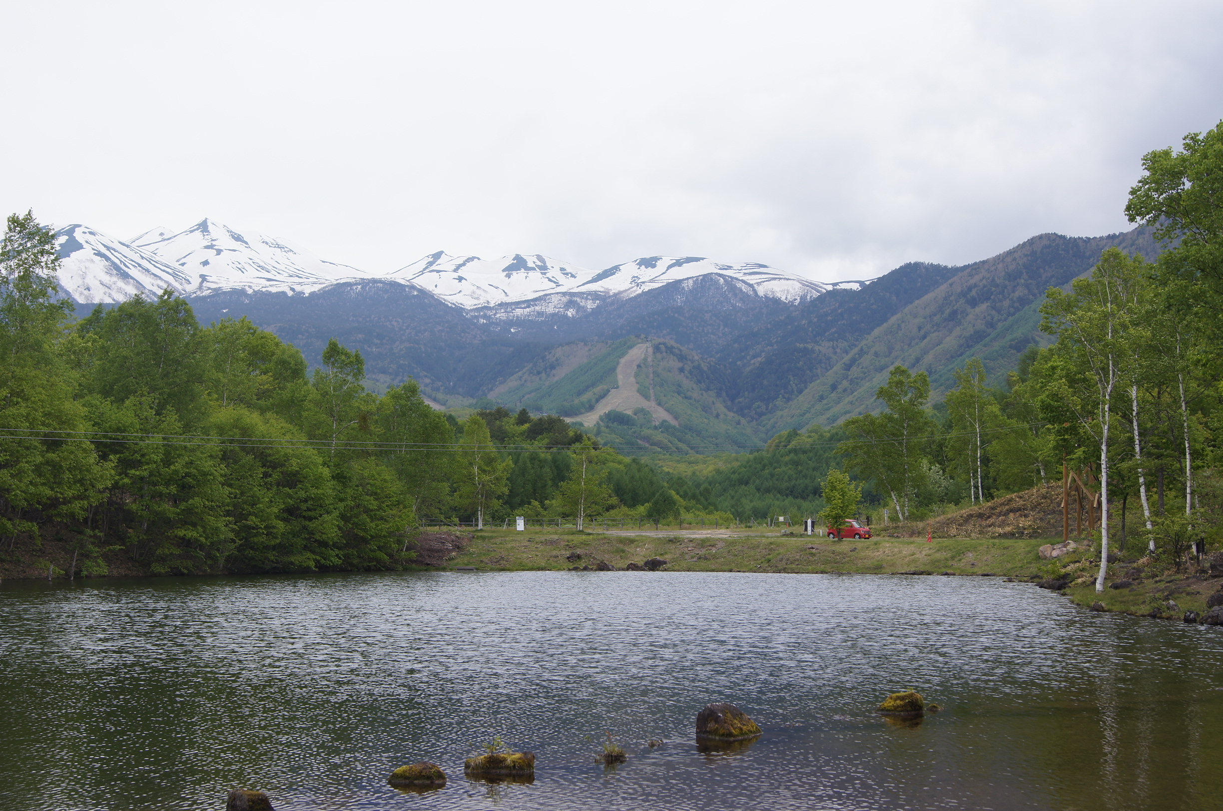 長野県松本市安曇の乗鞍高原にあるいがやレクリエーションランドにあるバッハアルプ湖を通して見た乗鞍岳（青空ならもっと美しかったのだろうが、残念ながら曇天でした）